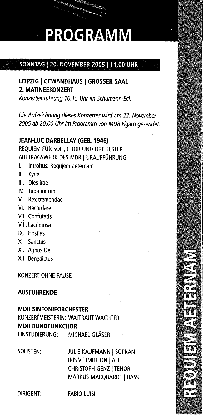 Besetzungszettel der Uraufführung von Requiem im Leipziger Gewandhaus am 20. November 2005